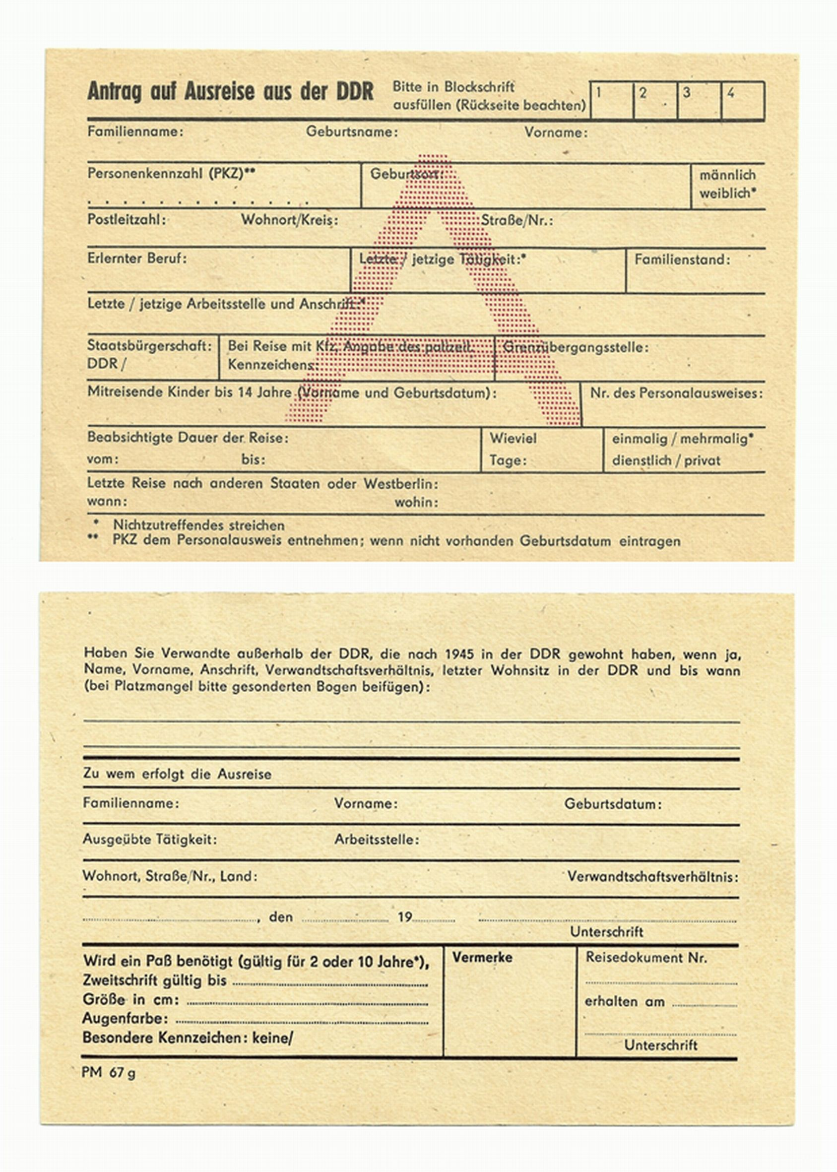 Antrag für Erteilung einer besuchsweisen Ausreise aus der DDR